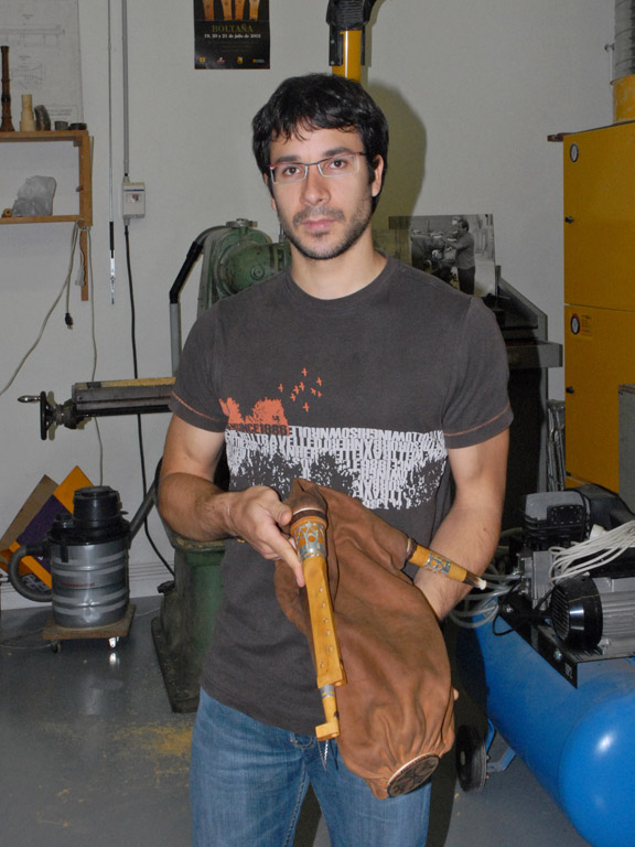 Le Centre Occitan des Musiques et Danses Traditionnelles (COMDT) Toulouse Midi-Pyrénées est un lieu de ressources consacré, à travers ses différents secteurs, à la culture occitane de tradition orale, principalement dans les domaines de la musique instrumentale, de la danse et du chant traditionnels. Il est membre de la FAMDT, Fédération nationale des Centres régionaux et associations de musiques et danses traditionnelles. Depuis sa création (30 ans) l’atelier de lutherie collabore avec d’autres chercheurs à la reconstitution d’instruments. Ainsi, il a pris une part importante dans le renouveau des flûtes, cornemuses et hautbois occitans. Il participe actuellement à une recherche interrégionale sur la bodega ou craba (cornemuse de la Montagne Noire). L’atelier de facture instrumentale réalise des aboès (hautbois du Couserans) : tonalité en Ré ; des hautbois de Valhourles (Rouergue) : tonalité en Sol et des boha (cornemuse des Landes de Gascogne) : tonalité en La et en Sol. Sur la photo, Alexis Lafontan, stagiaire à l'atelier, présente un instrument qui vient d'être fabriqué.